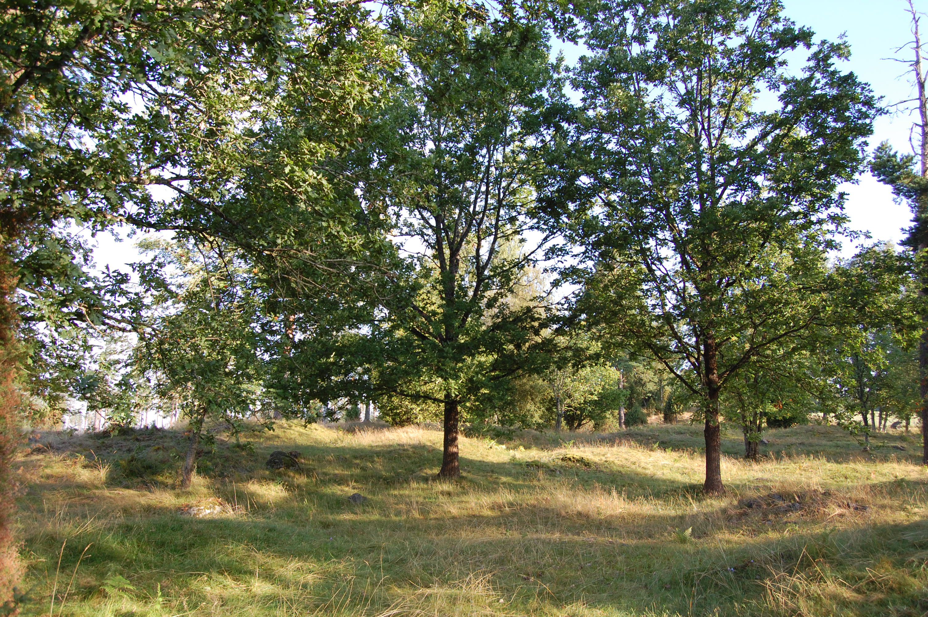 Uppkara gravfält, RAÄ-nummer Vallsjö 20:1